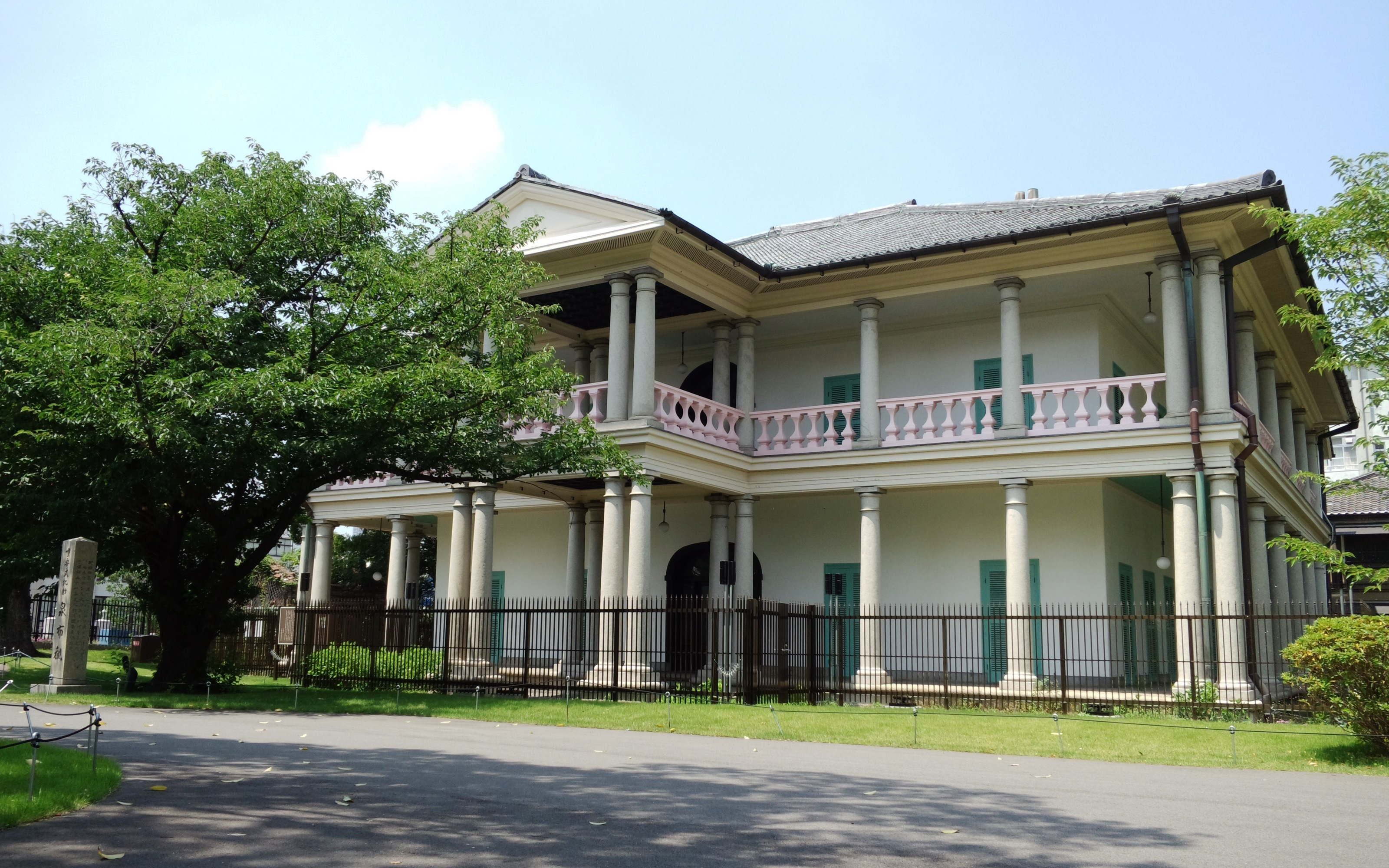 泉布観を北東から望む